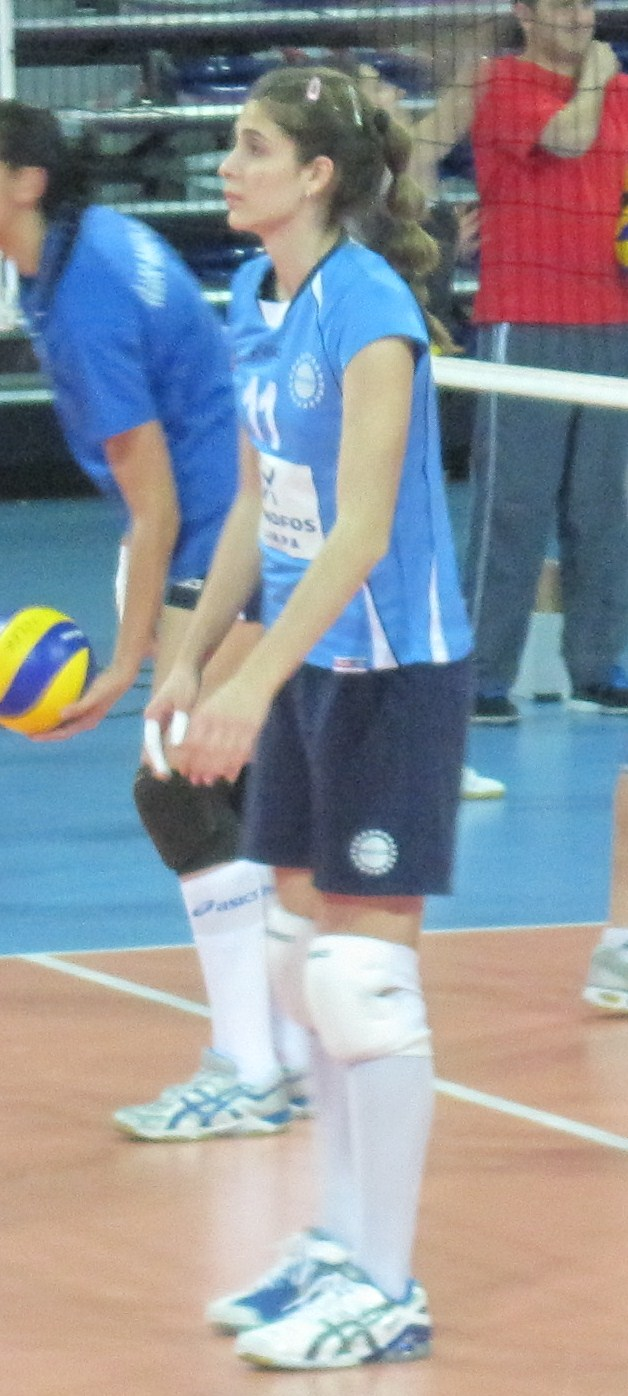 Turkish volleyball player Ezgi Dağdelenler